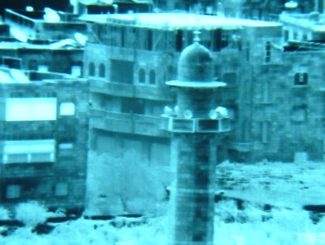 תמונה דרך אמצעי ראייה תרמי. צולם על ידי אחי.